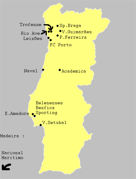 carte des clubs du championnat du portugal de football 2008-2009